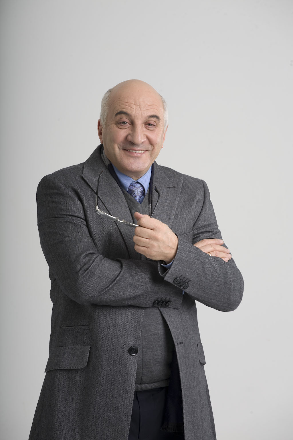 Гендель Леонид Яковлевич